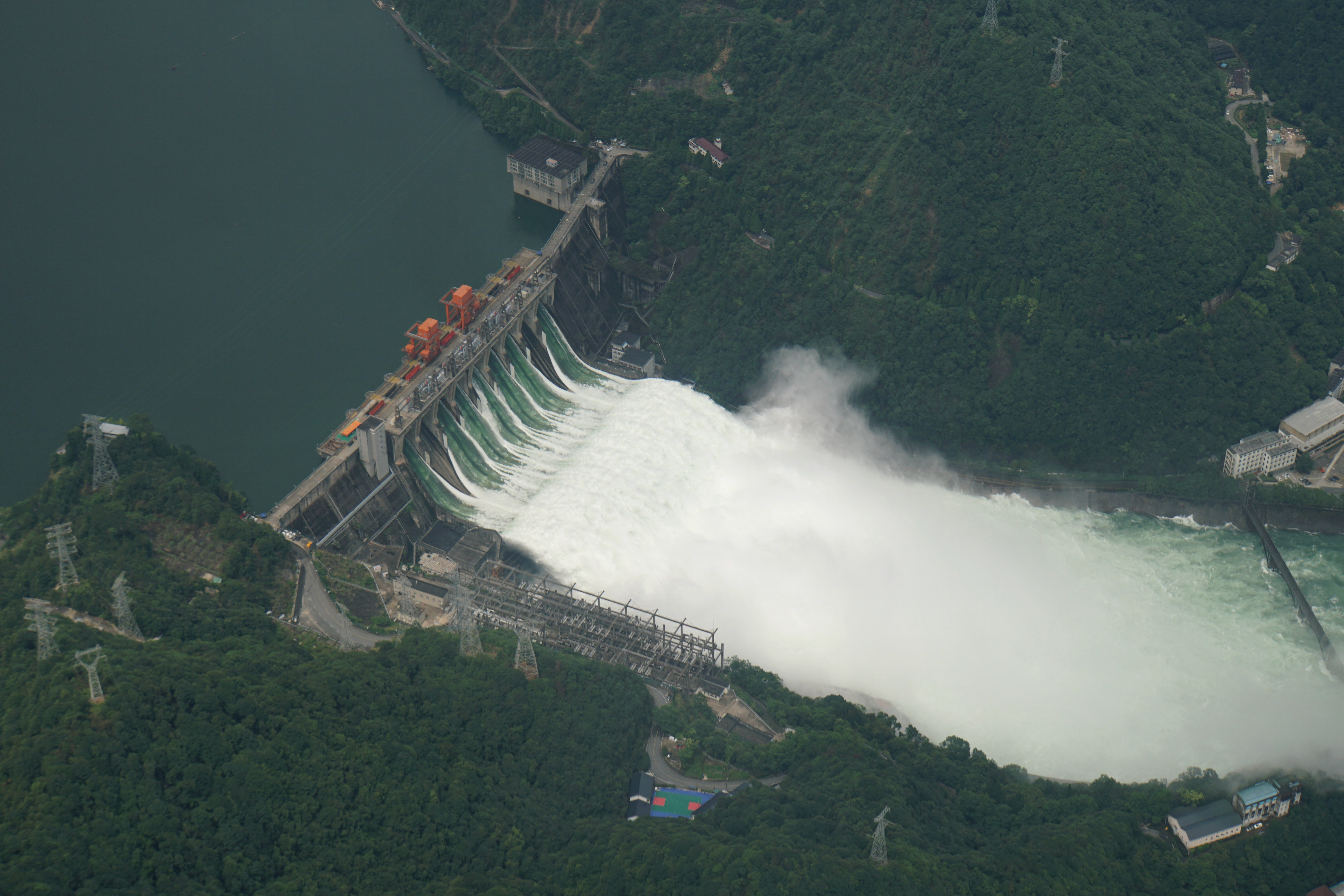 泄洪中的新安江水电站，2020年